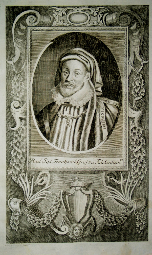 Paul Graf von Falkenstein (gest. 1620 Wien): Paul Sixt Trautsamb, Graf zu Falckenstein. Kaiserlicher Geheimer Rat, Oberhofmarschall, Reichshofratspräsident, Niederösterreichischer Statthalter; Ritter des Goldenen Vlieses.